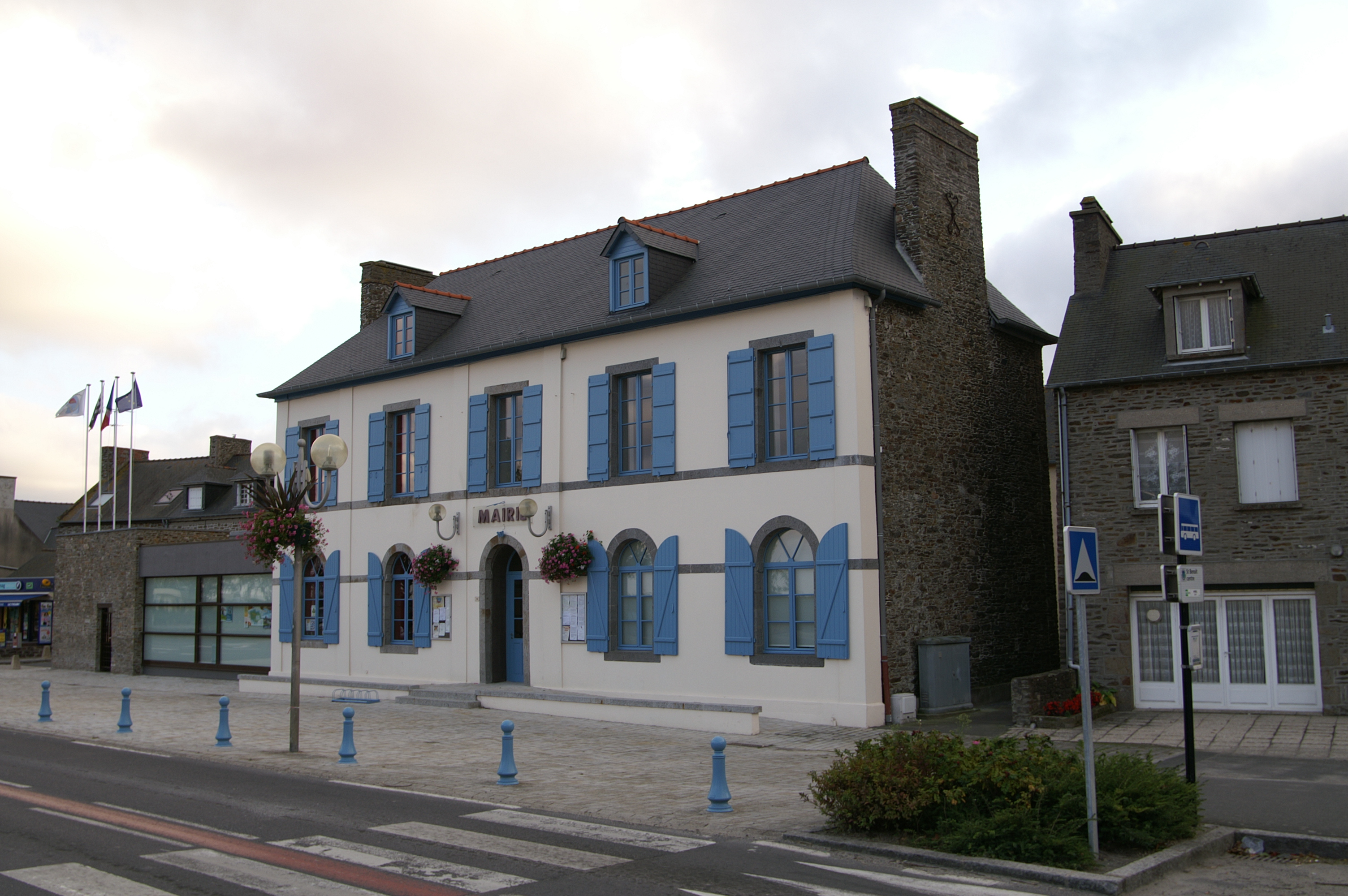 Mairie de Saint-Benoît-des-Ondes.